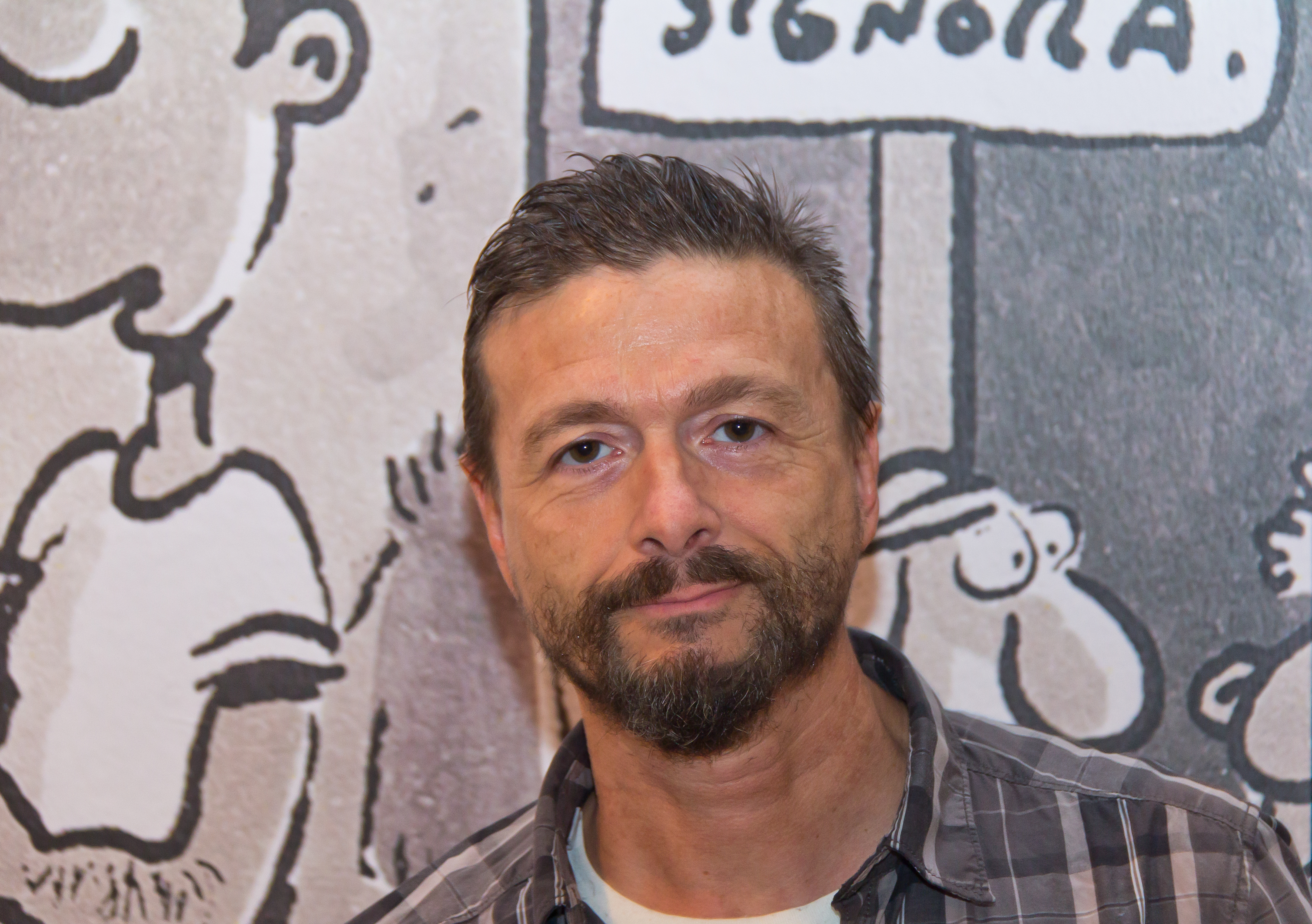 Pressegespräch zur Ausstellung im Kölnischen Stadtmuseum: „Ralf König: Das Ursula-Projekt. Elftausend Jungfrauen“ Foto: Ralf König